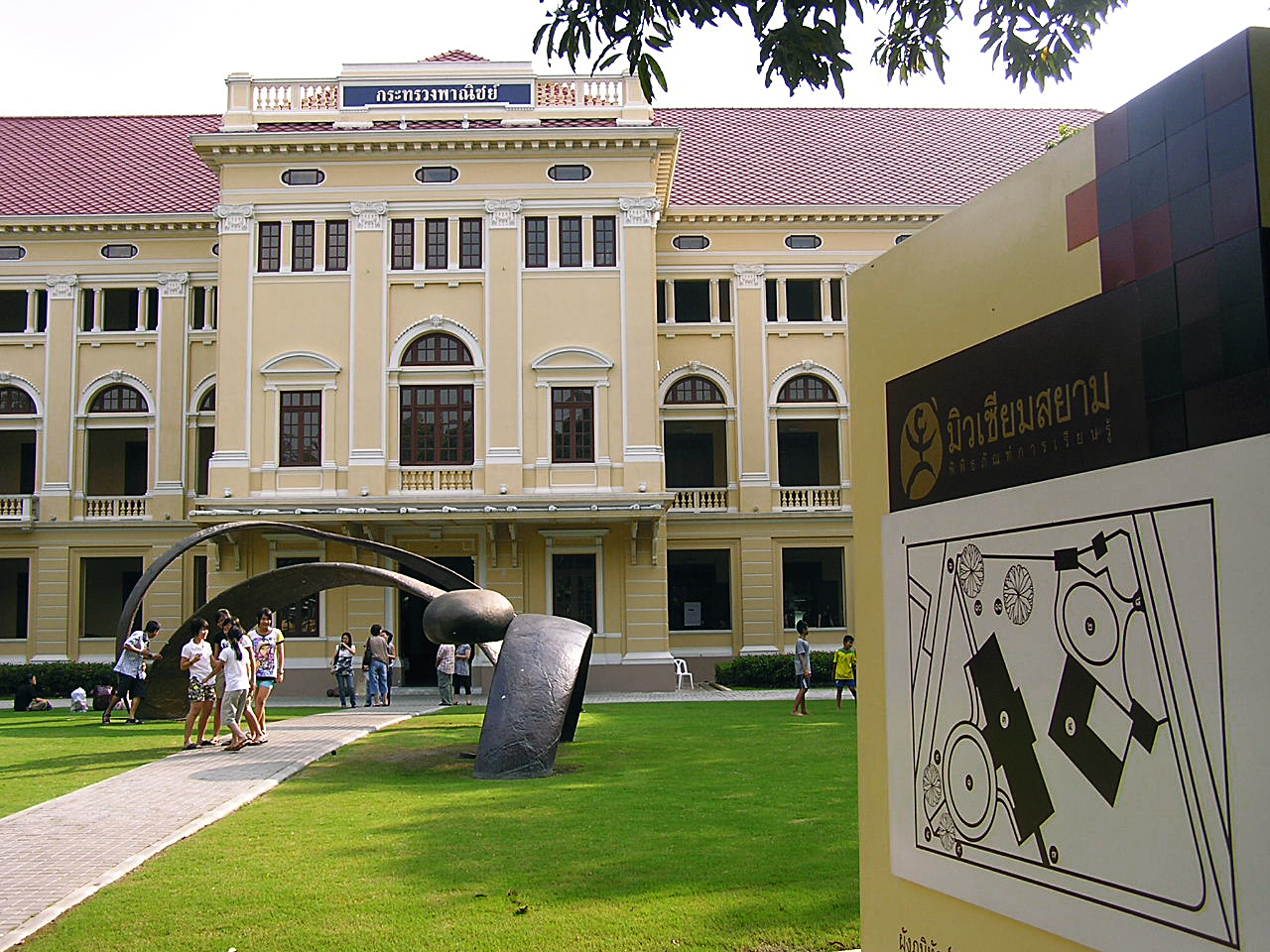 Museum Siam, Bangkok, Thailand